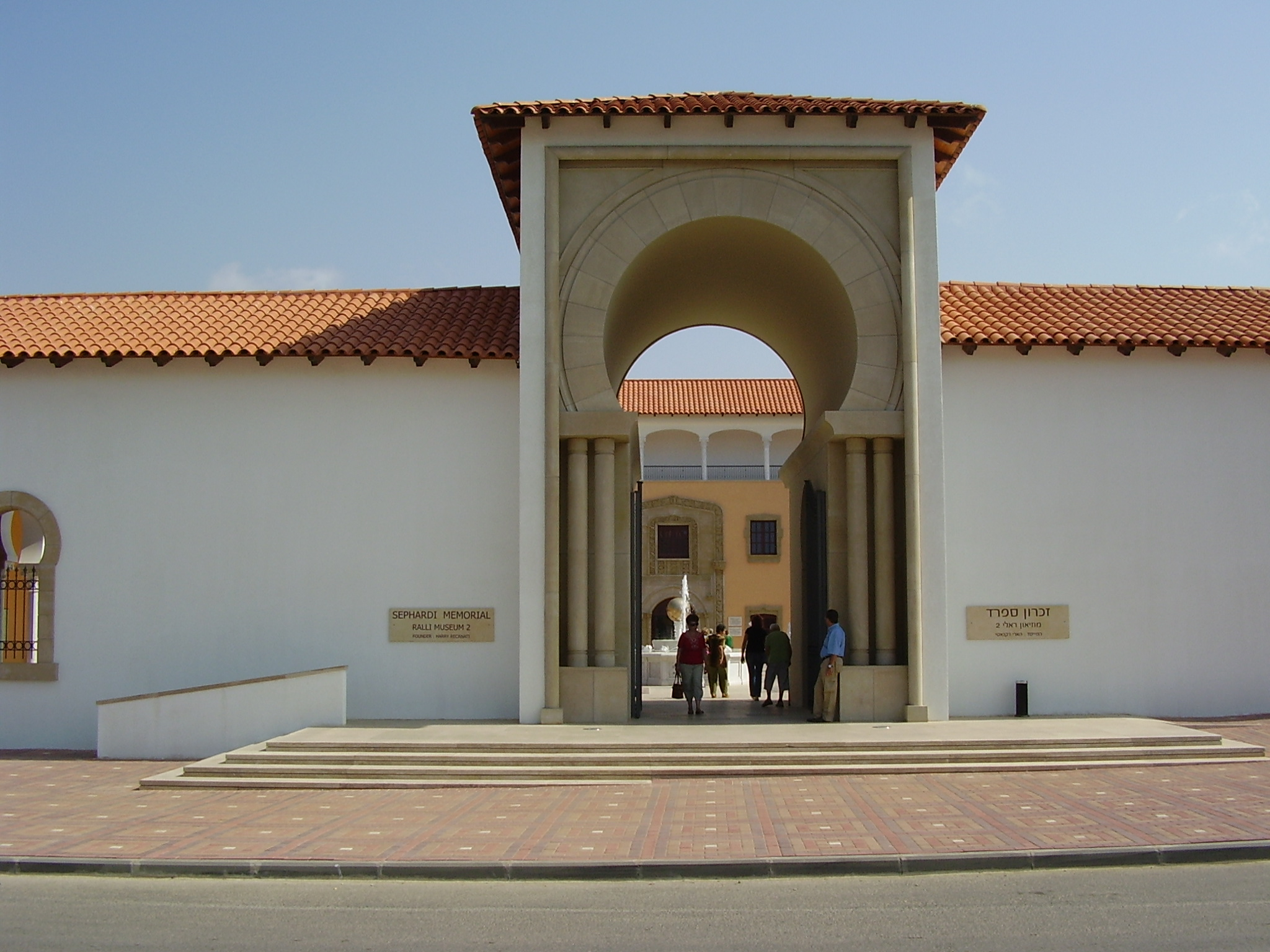 ralli museum, cesarea, israel